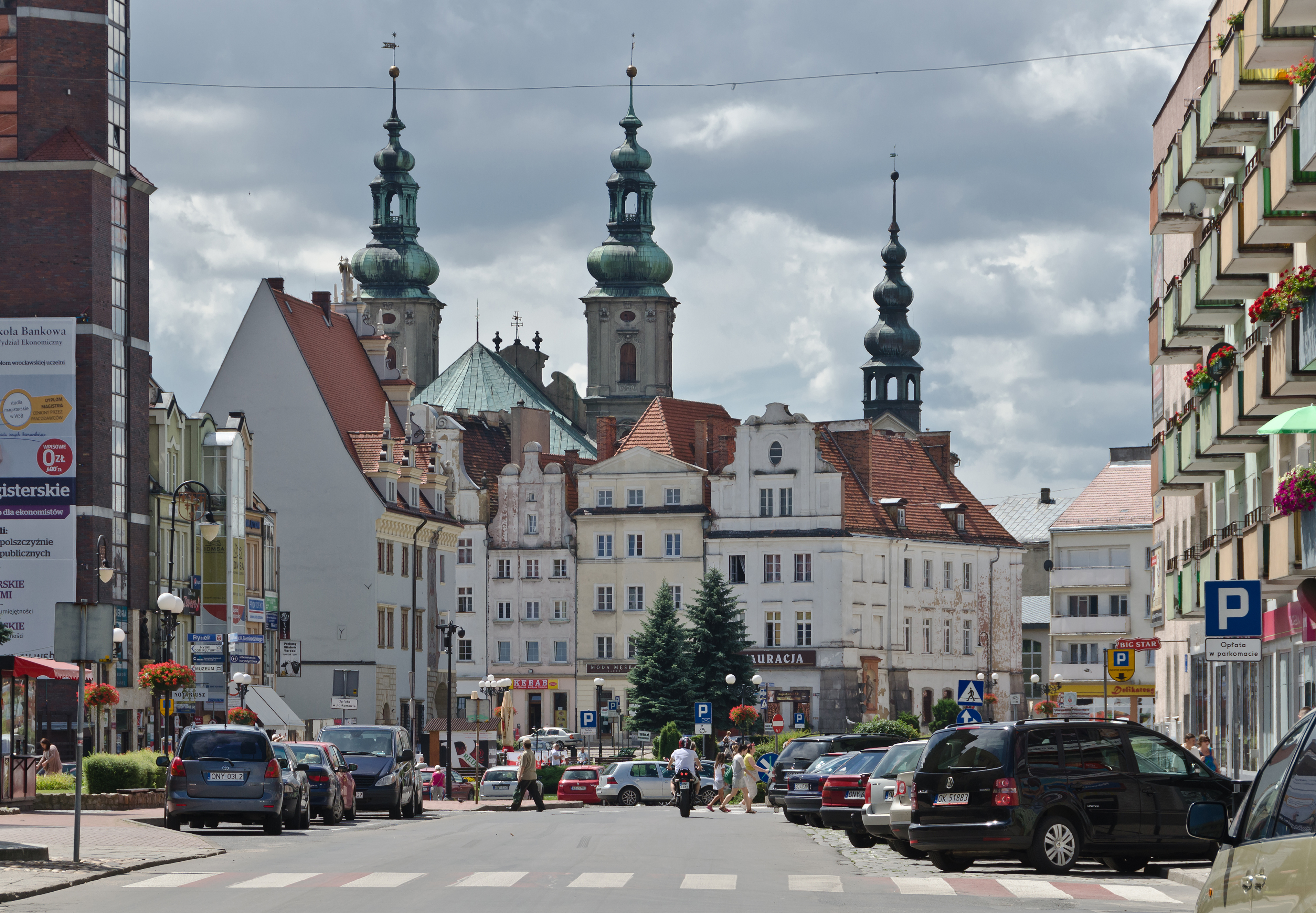 Nysa, Stare Miasto